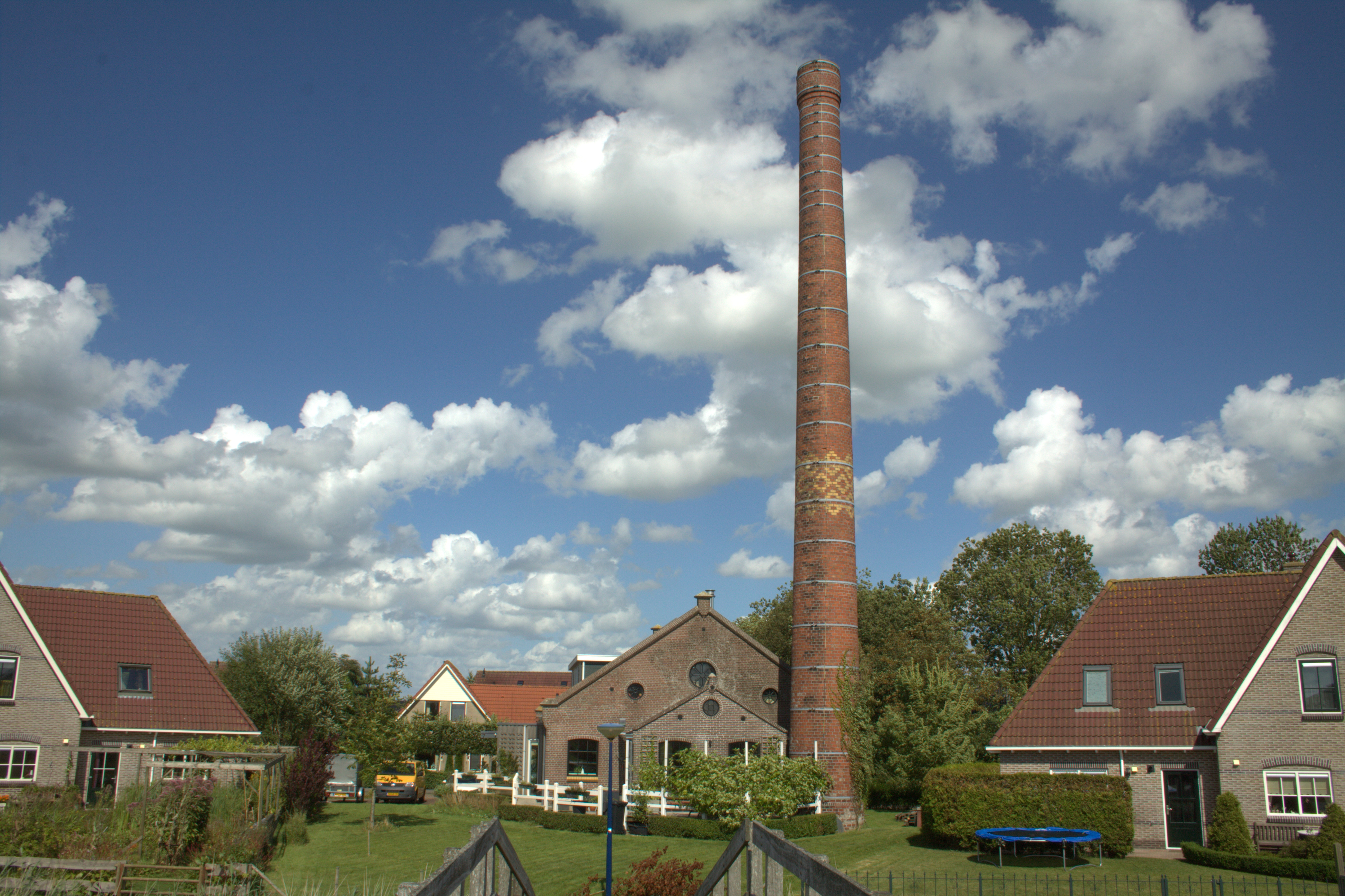 Bij de schoorsteen van de voormalige zuivelfabriek in Easterlittens.